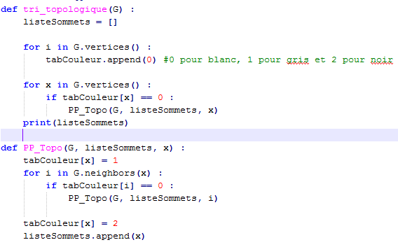 Code en python pour ressortir les sommets d'un graphe dans l'ordre topologique.